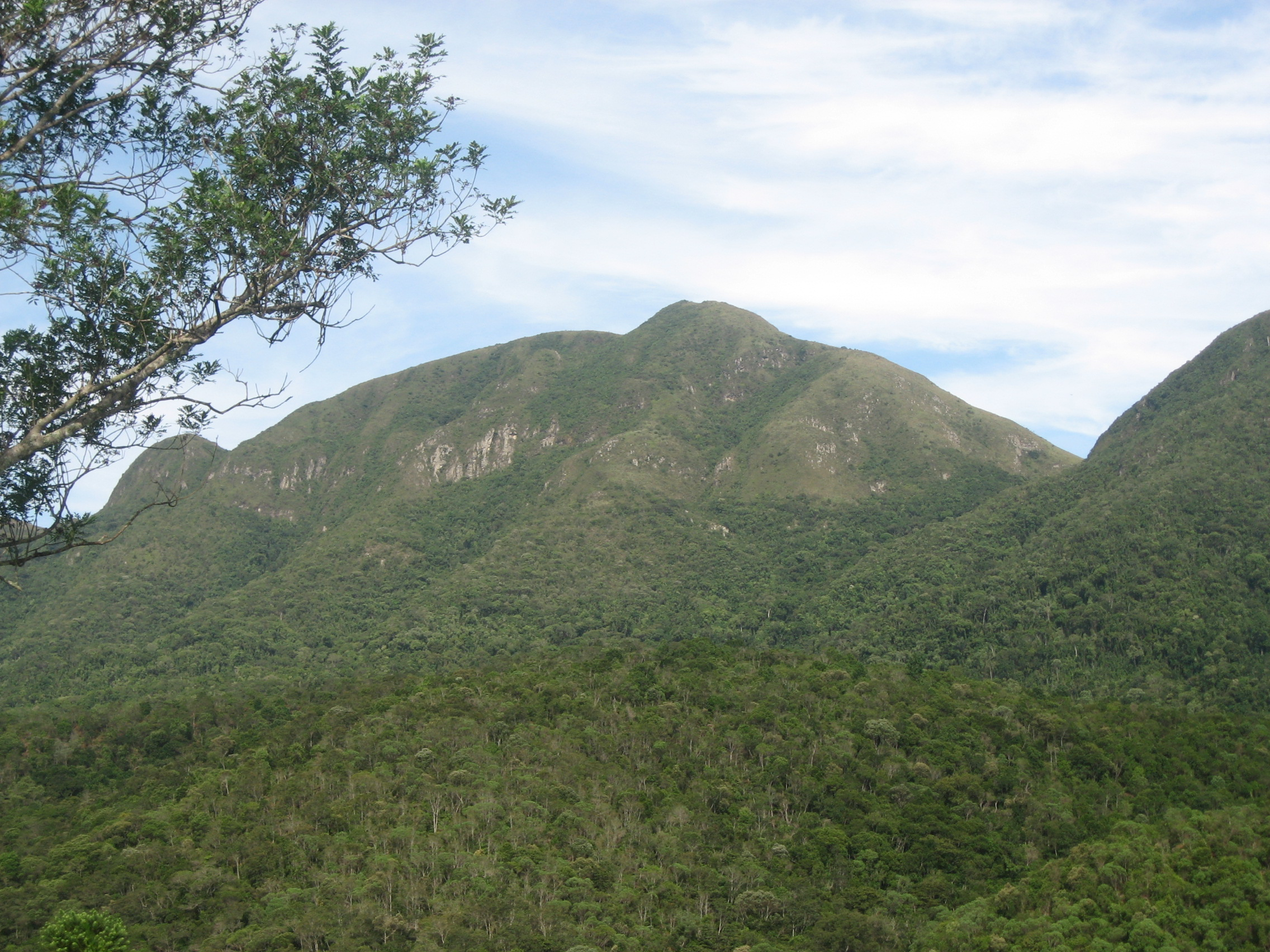 Serra da Bocaina localizada no limite entre os municípios de Bocaiúva do Sul e Tunas do Paraná.Pertencente à cadeia de montanhas da Serra do Mar, seu pico mais alto(1300 m) está localizado na localidade de Pedra Branca.